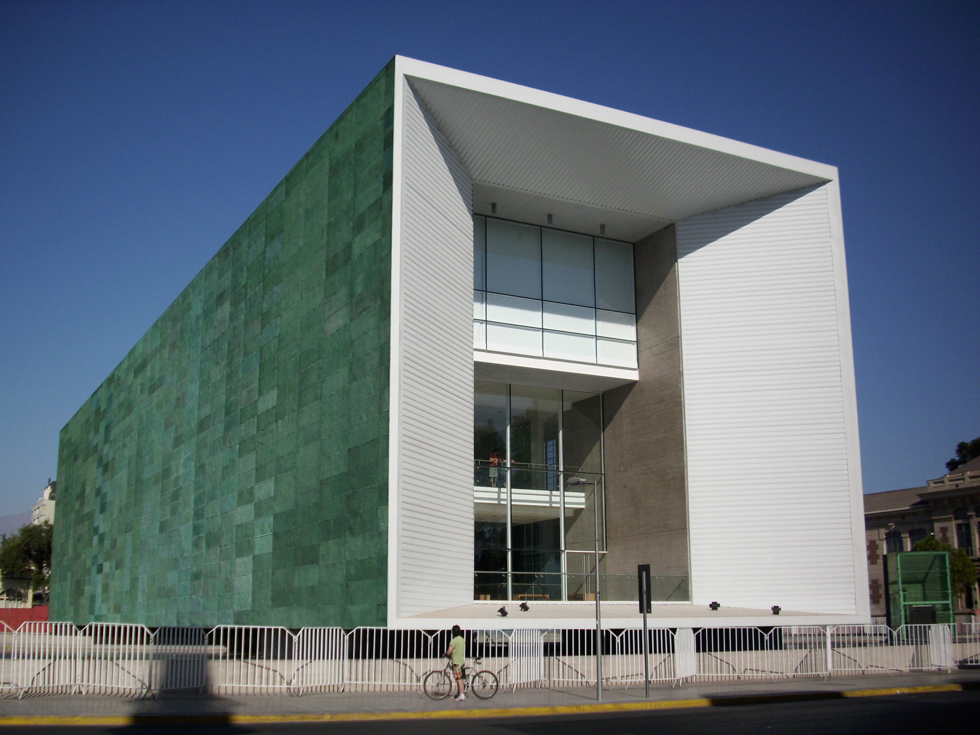 La fachada del Museo de la Memoria y los Derechos Humanos. Ubicado en la calle Matucana 501 (esquina Catedral), en Santiago de Chile. 21 de febrero de 2010.